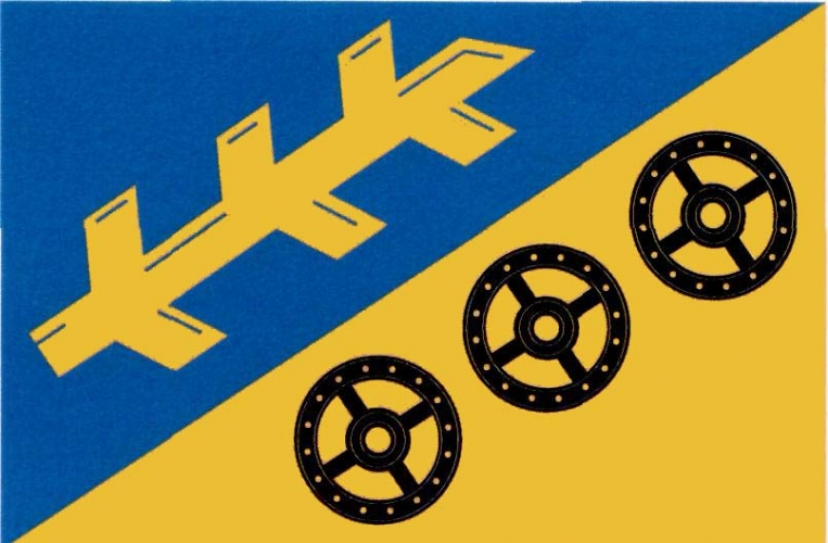 Vlajka obce Strašice